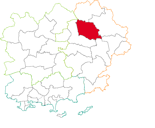 Situation du canton dans le département du Var